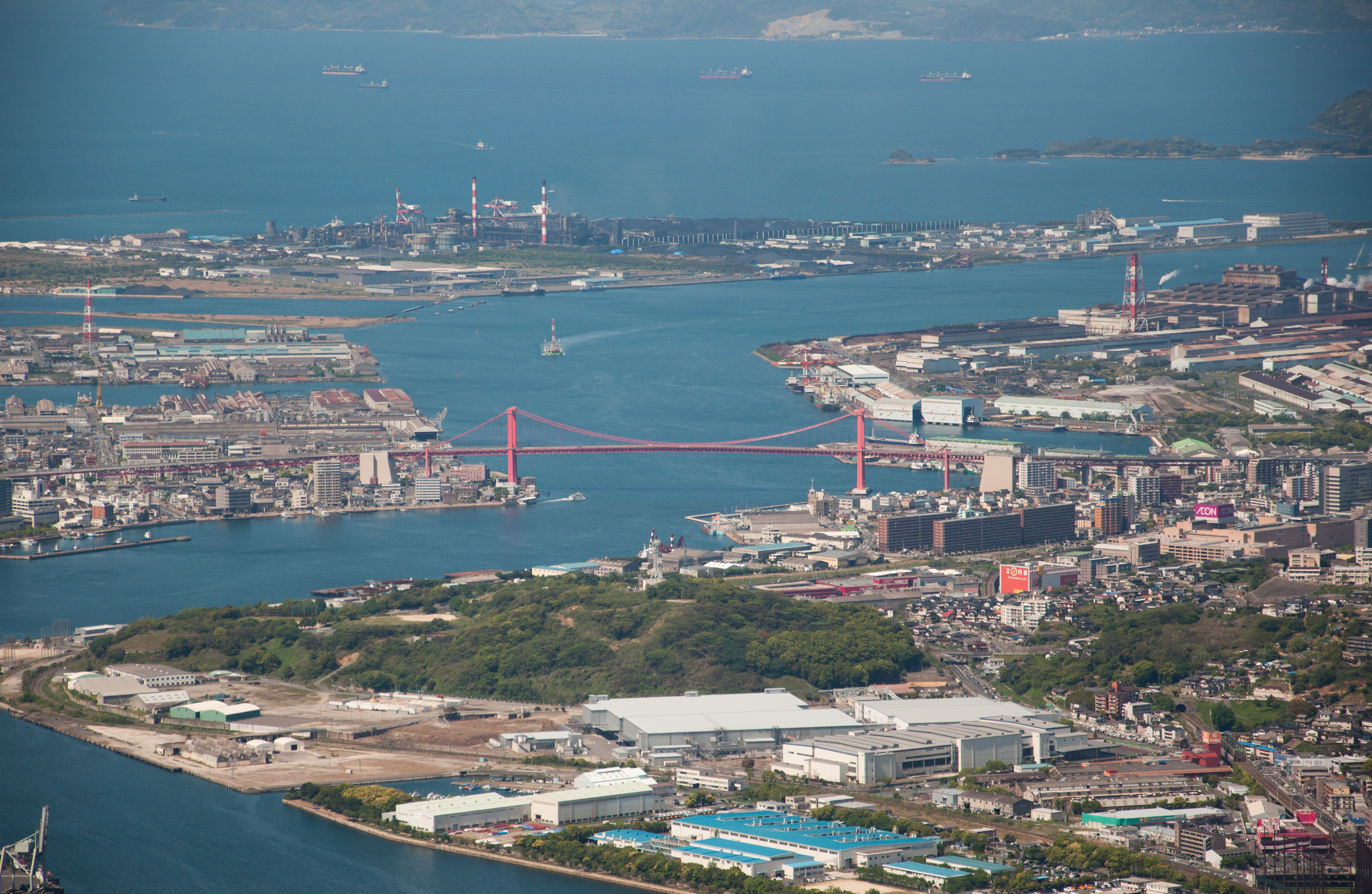 北九州市の皿倉山頂上より撮影した若戸大橋。